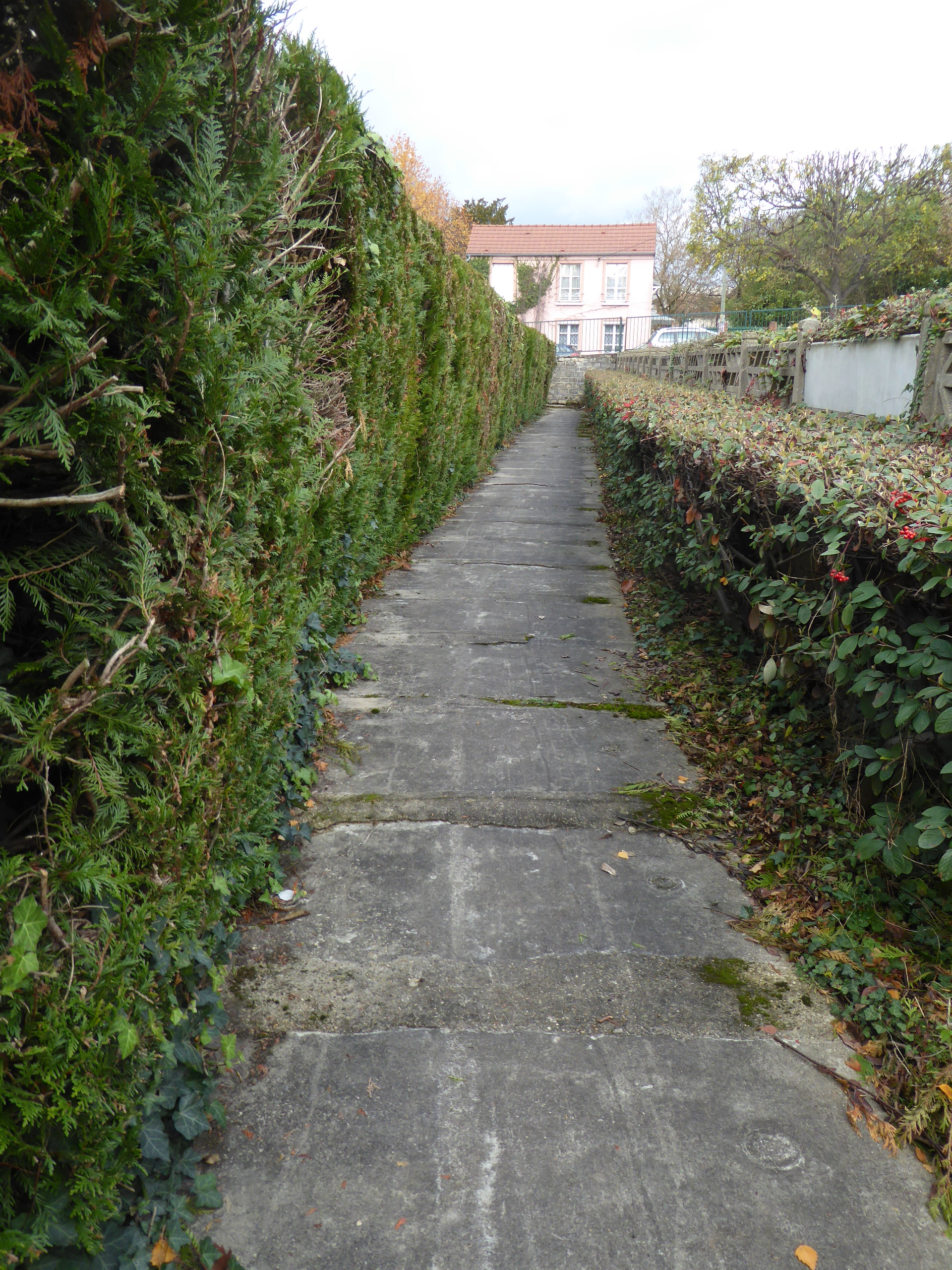 L'Haÿ-les-Roses Bièvre recouverte dans le Parc de la Bièvre